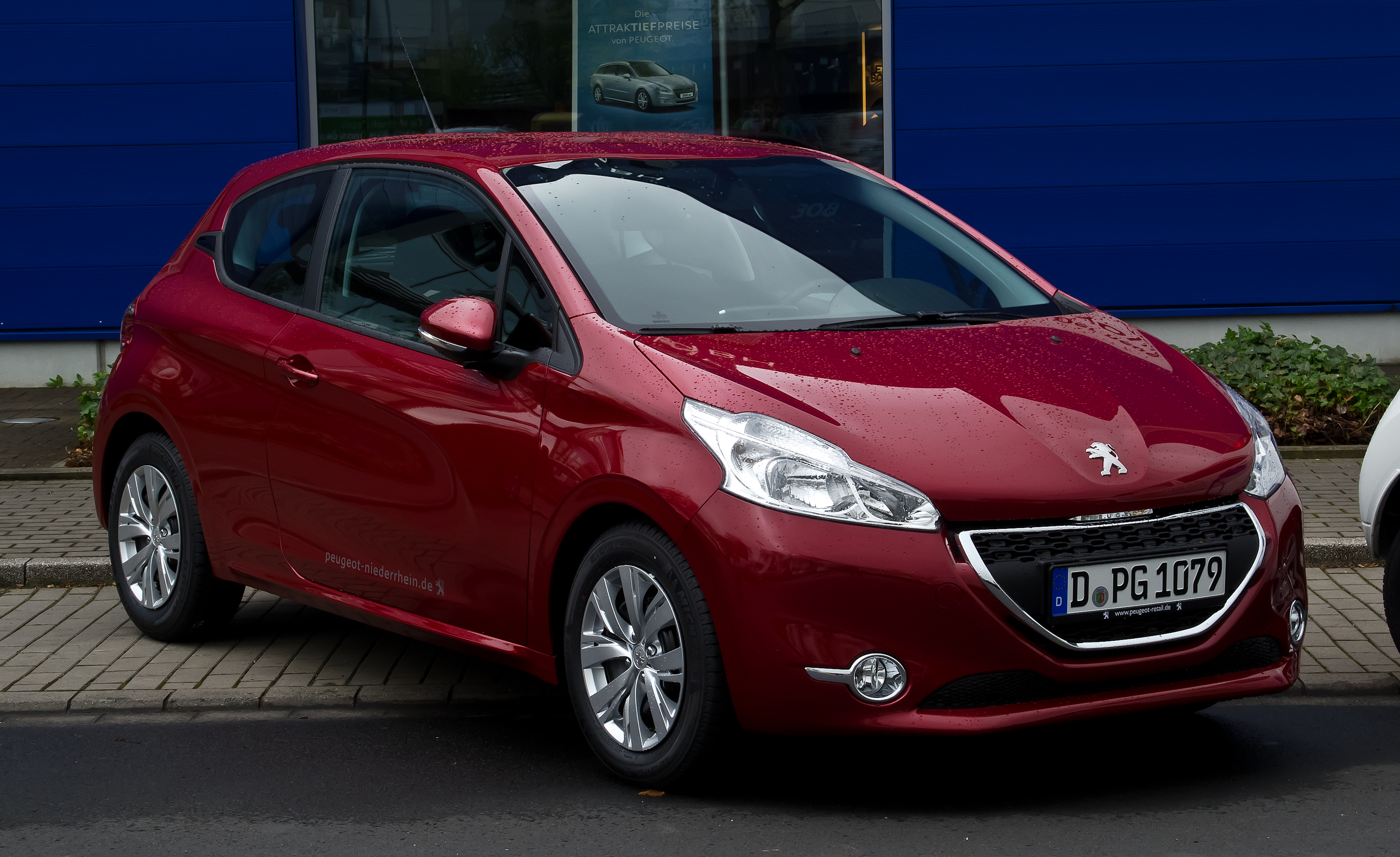 Peugeot 208 95 VTi Active